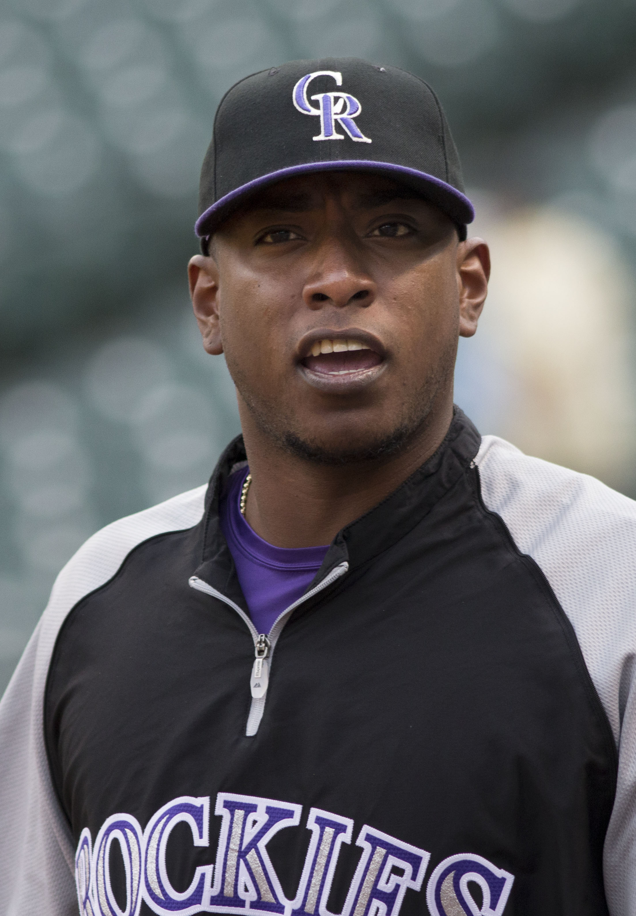 Edgmer Escalona